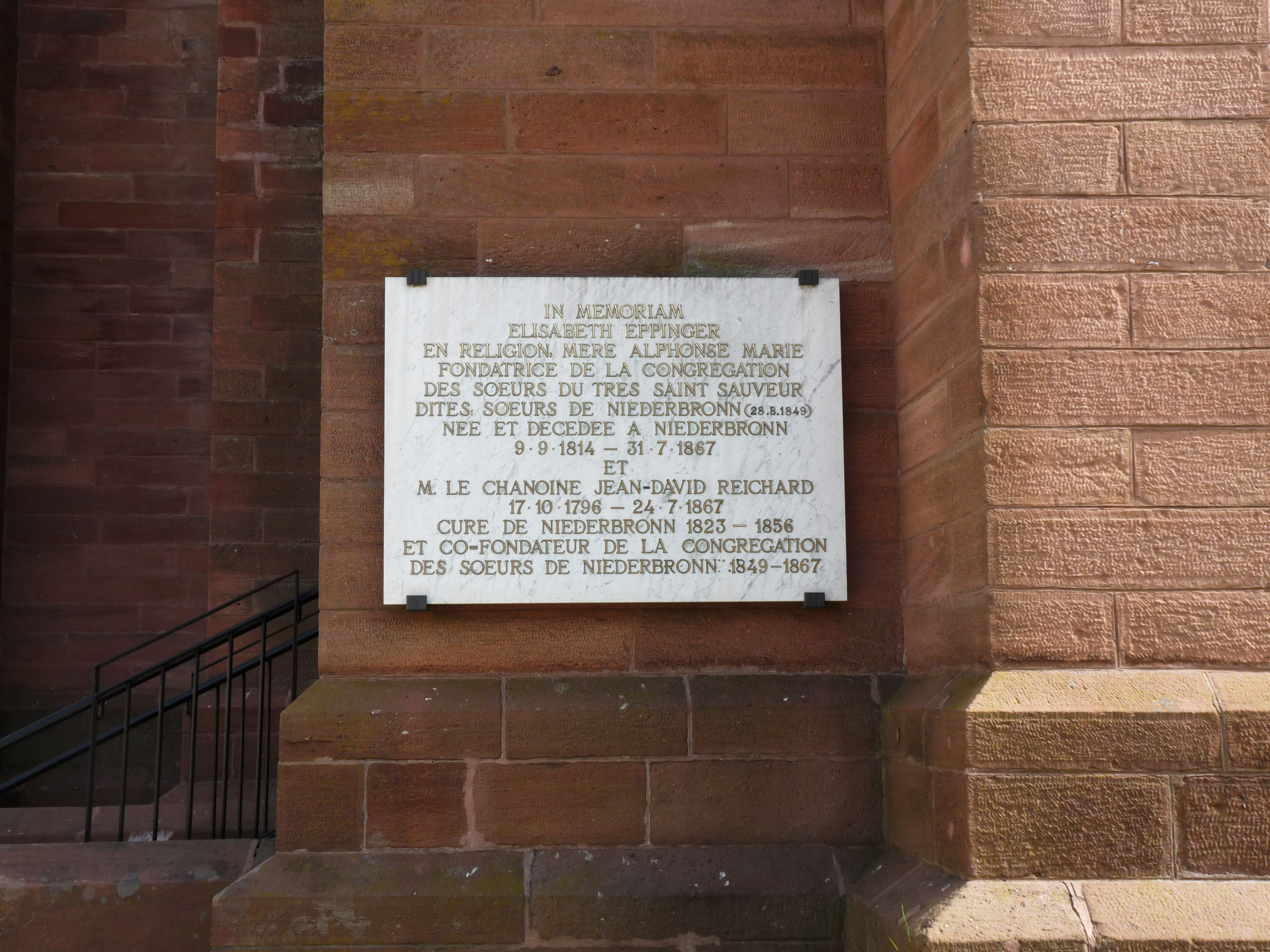 Plaque dédiée à Elisabeth Eppinger, fondatrice de la congrégation du Très Saint Sauveur. Eglise Saint-Martin, Niederbronn-les-Bains (Bas-Rhin).